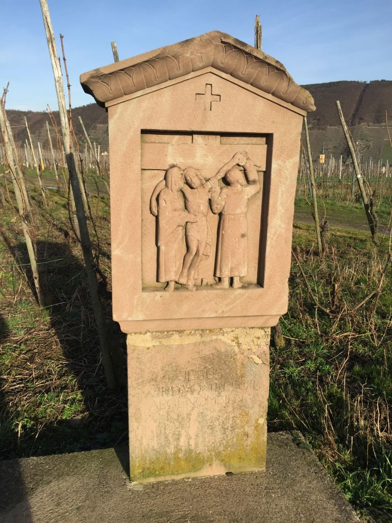 Kreuzweg Trittenheim - Station 13 von 14